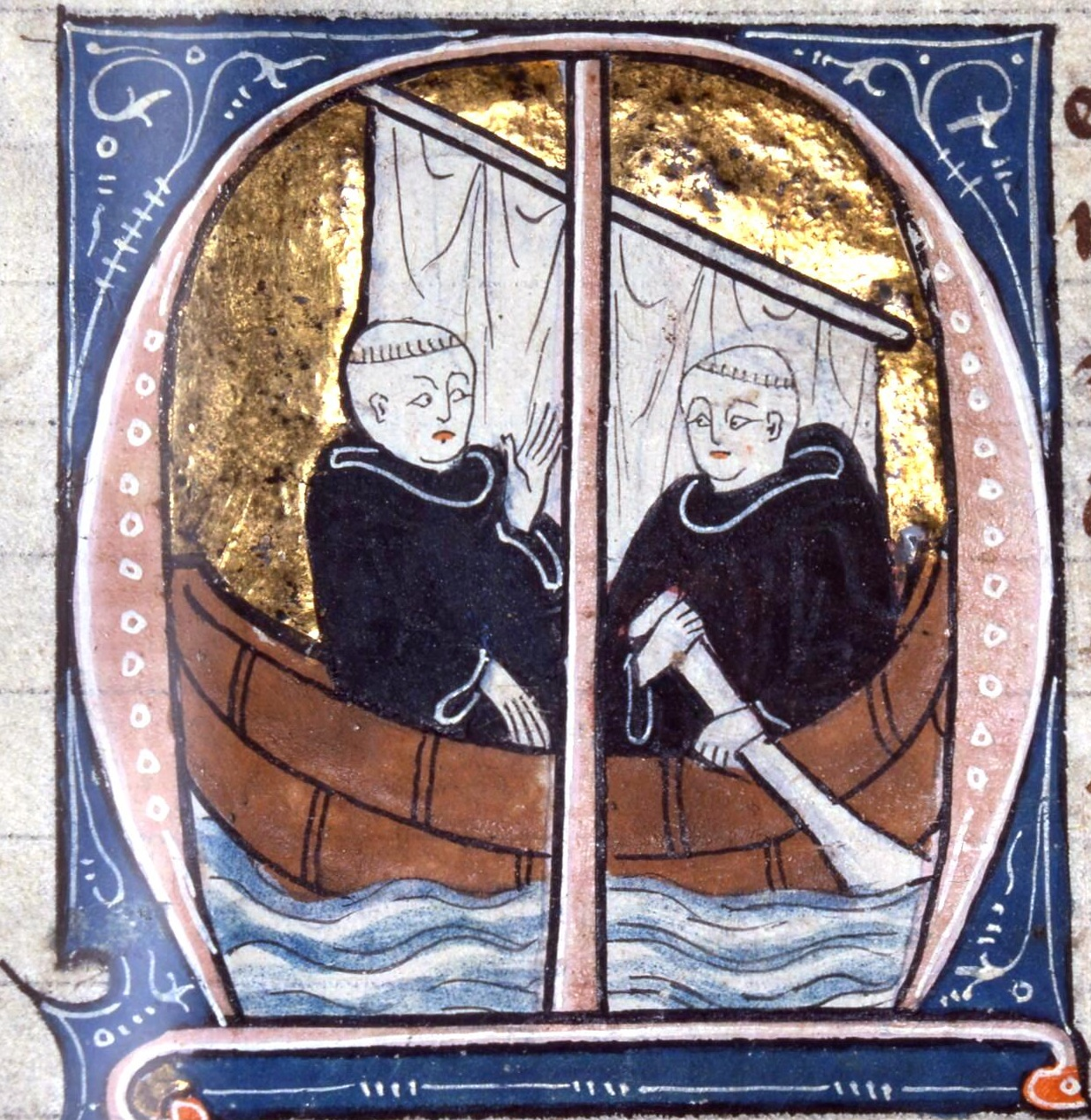 La navigation de St Brendan, Image du Monde, lettrine de "Maître de Thomas de Maubeuge". Vers 1304